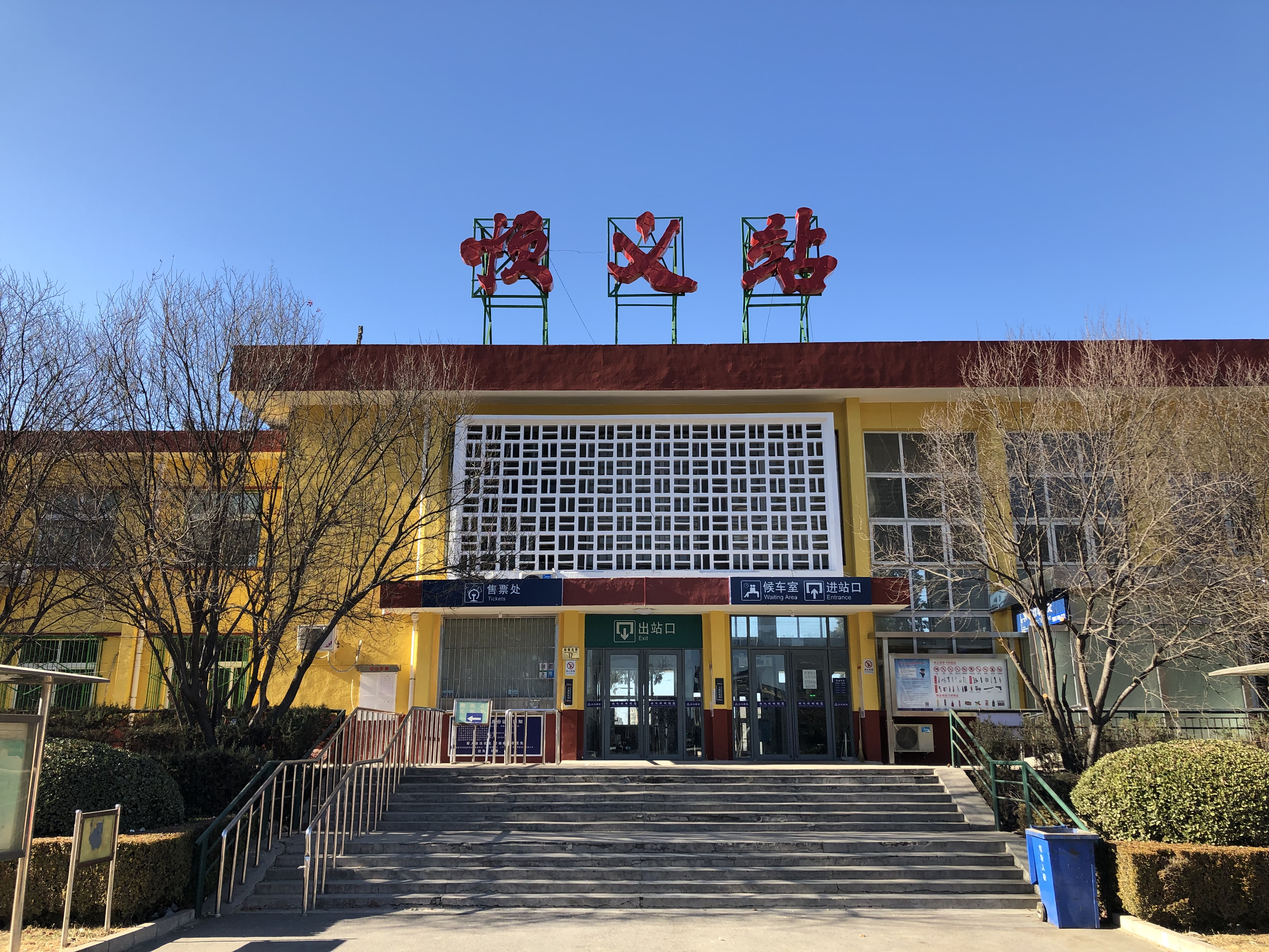 顺义火车站站房